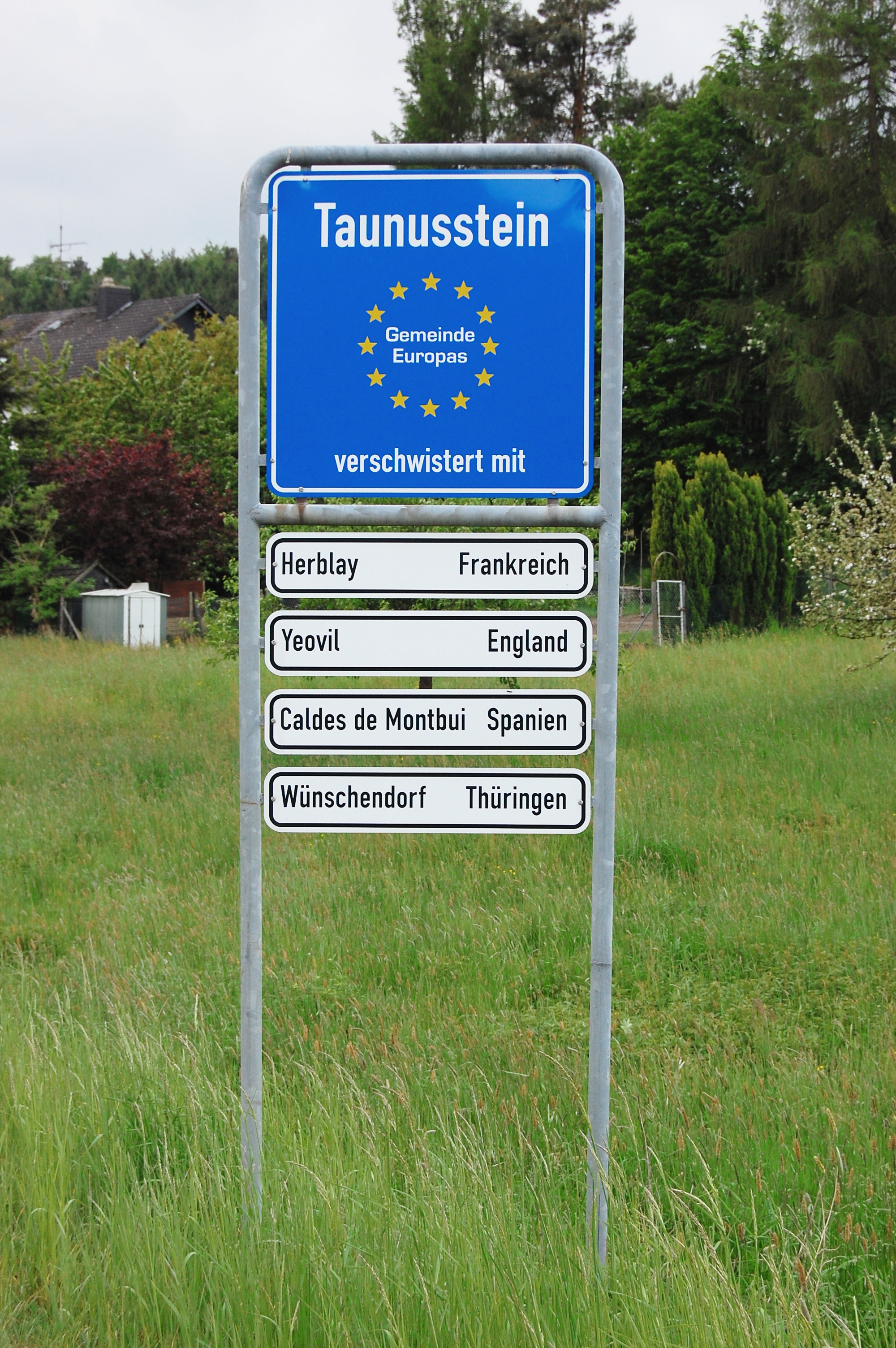 Schild in Wingsbach über Taunussteins Städtepartnerschaften